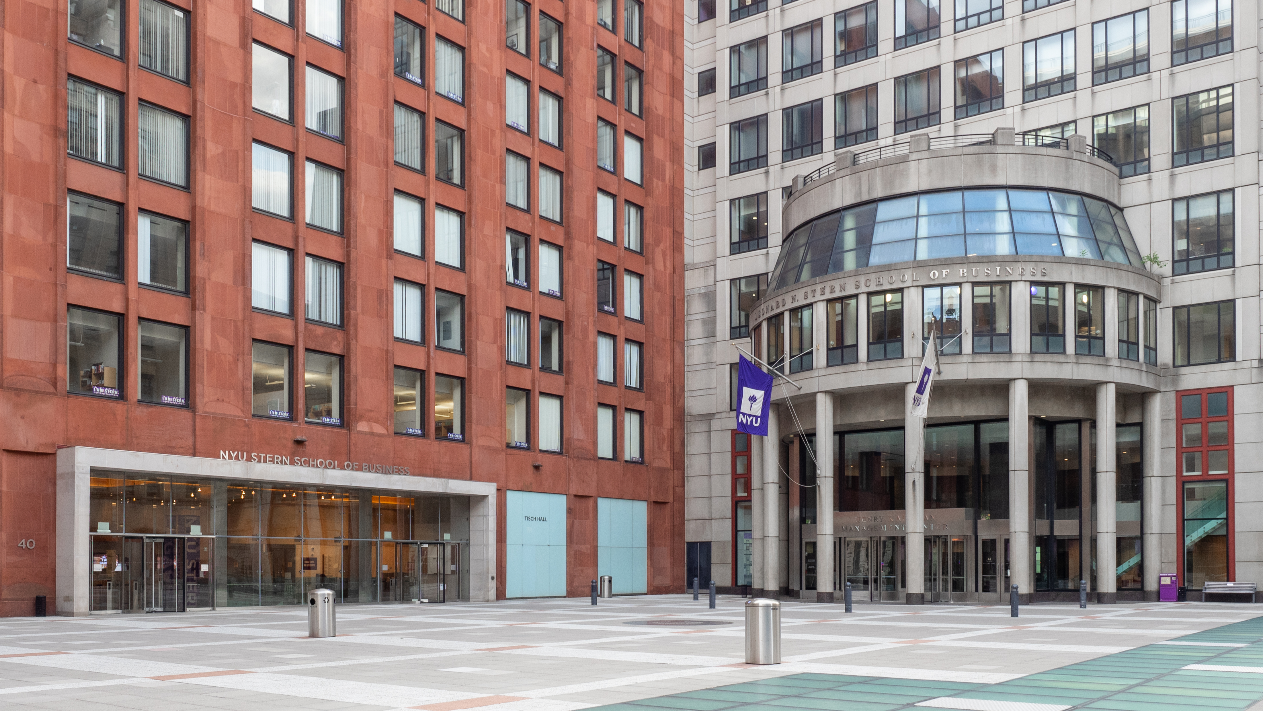 NYU, Greenwich Village, NYC